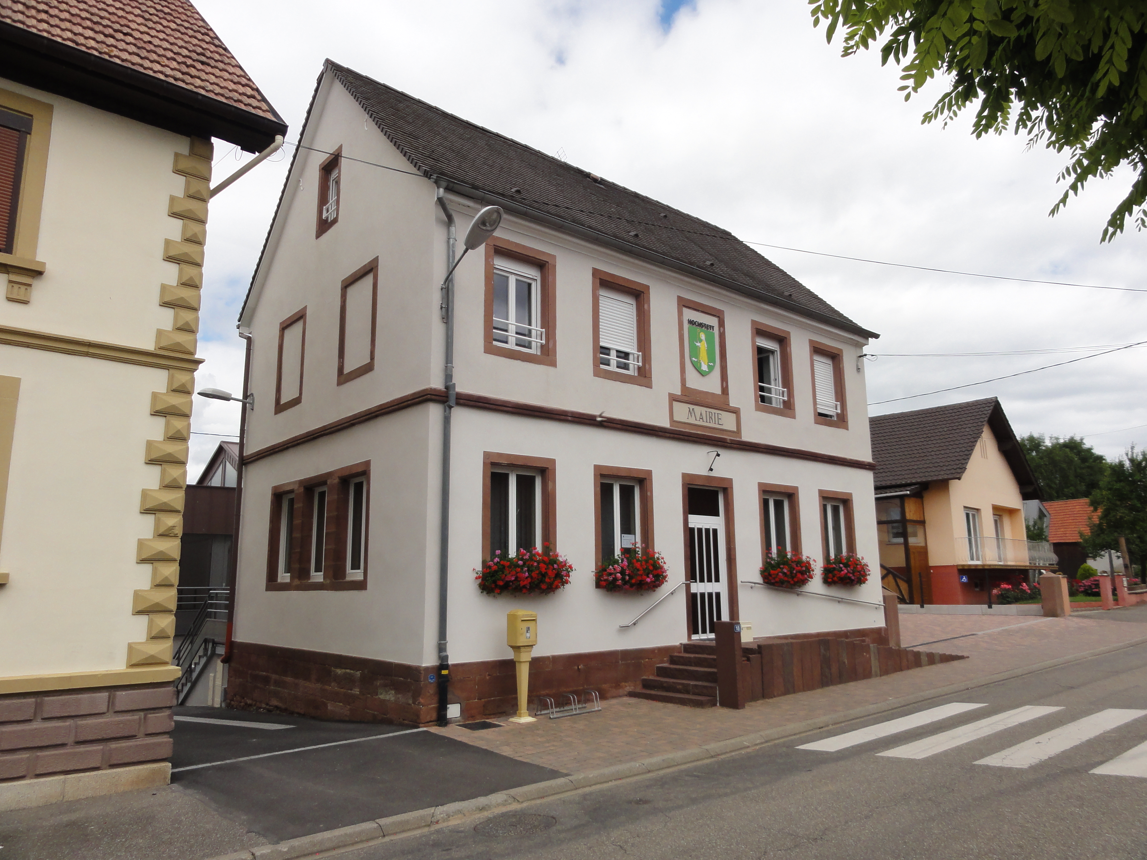 Alsace, Bas-Rhin, Hochstett, Mairie-école (XIXe), rue du Village. .